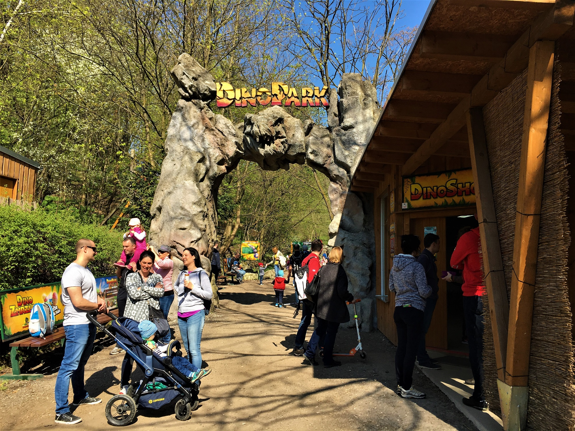 DinoPark vstup Bratislava